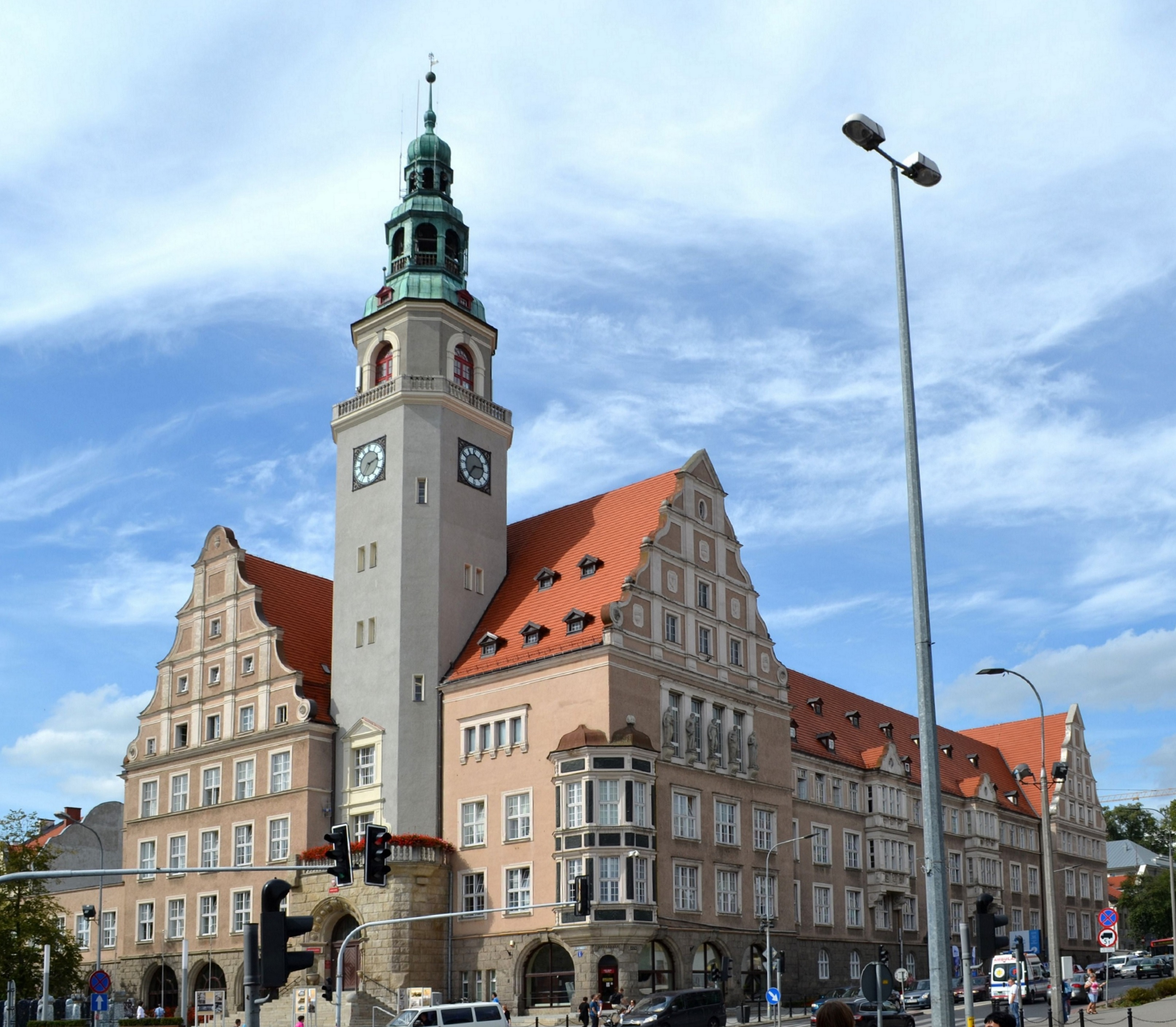 Olsztyn, ratusz (nowy), 1912-1915